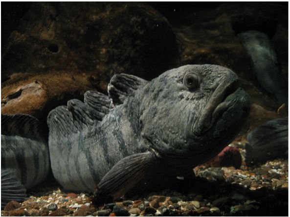 Seewolf im Havetshus